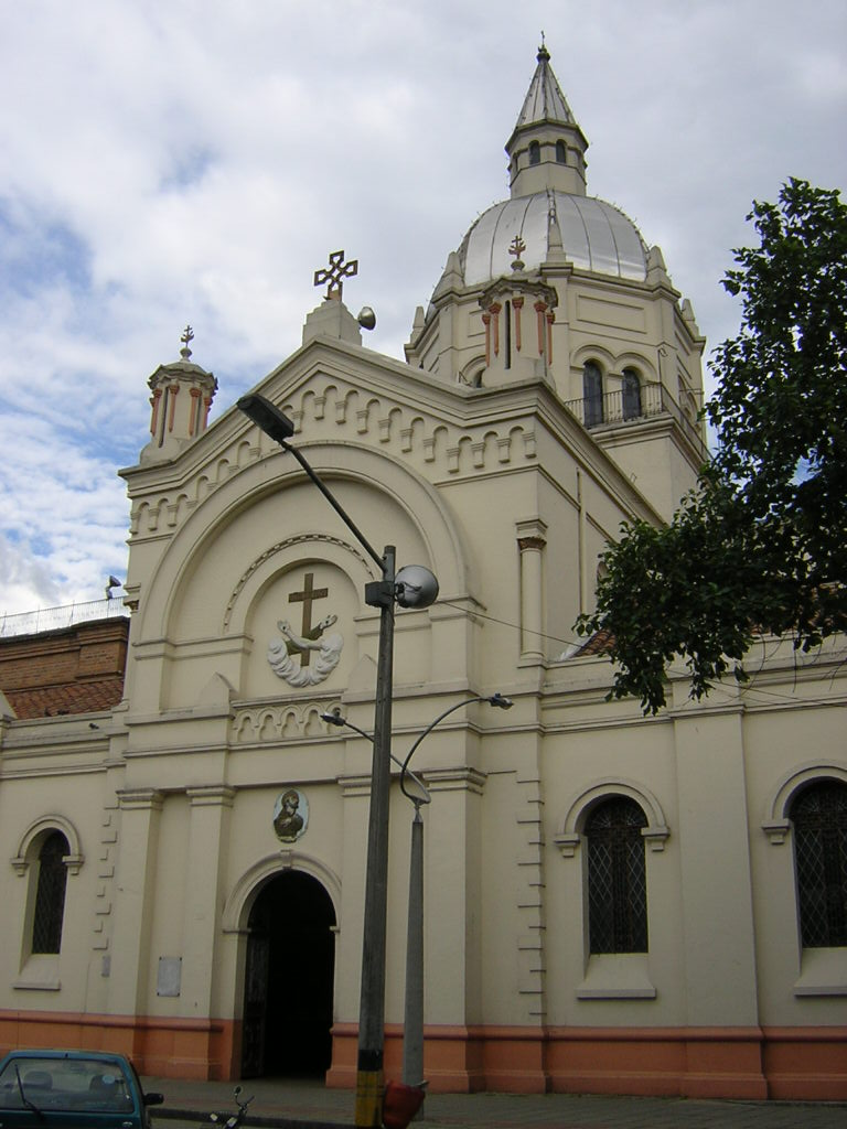 Iglesia de San Benito, Medellín, Colombia.